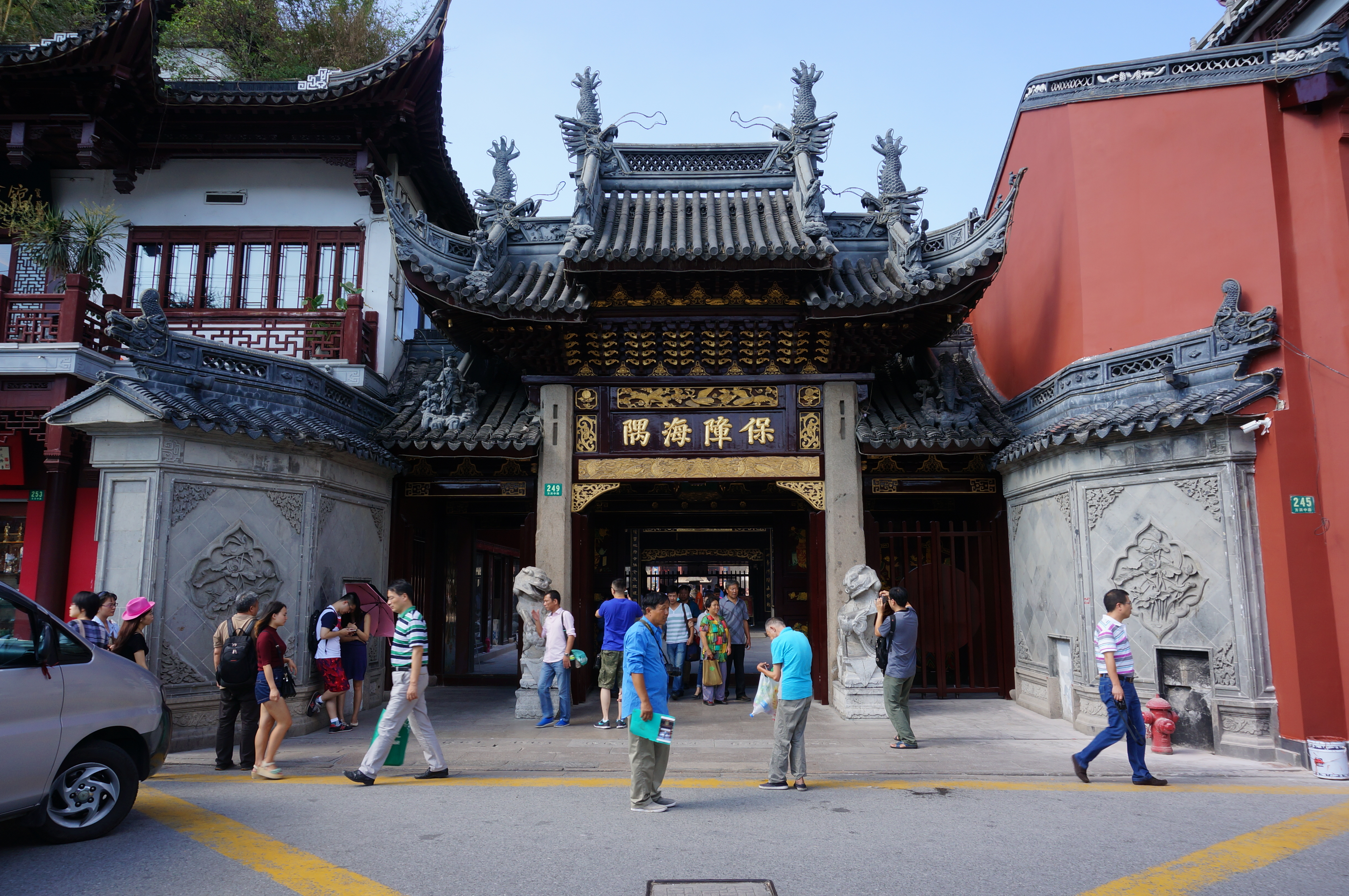 上海城隍庙，山门南侧。